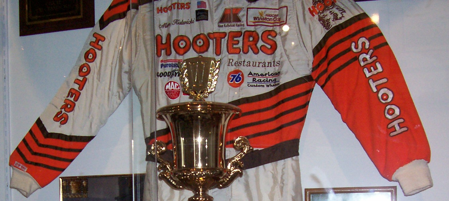 An Alan Kulwicki Hooters jersey